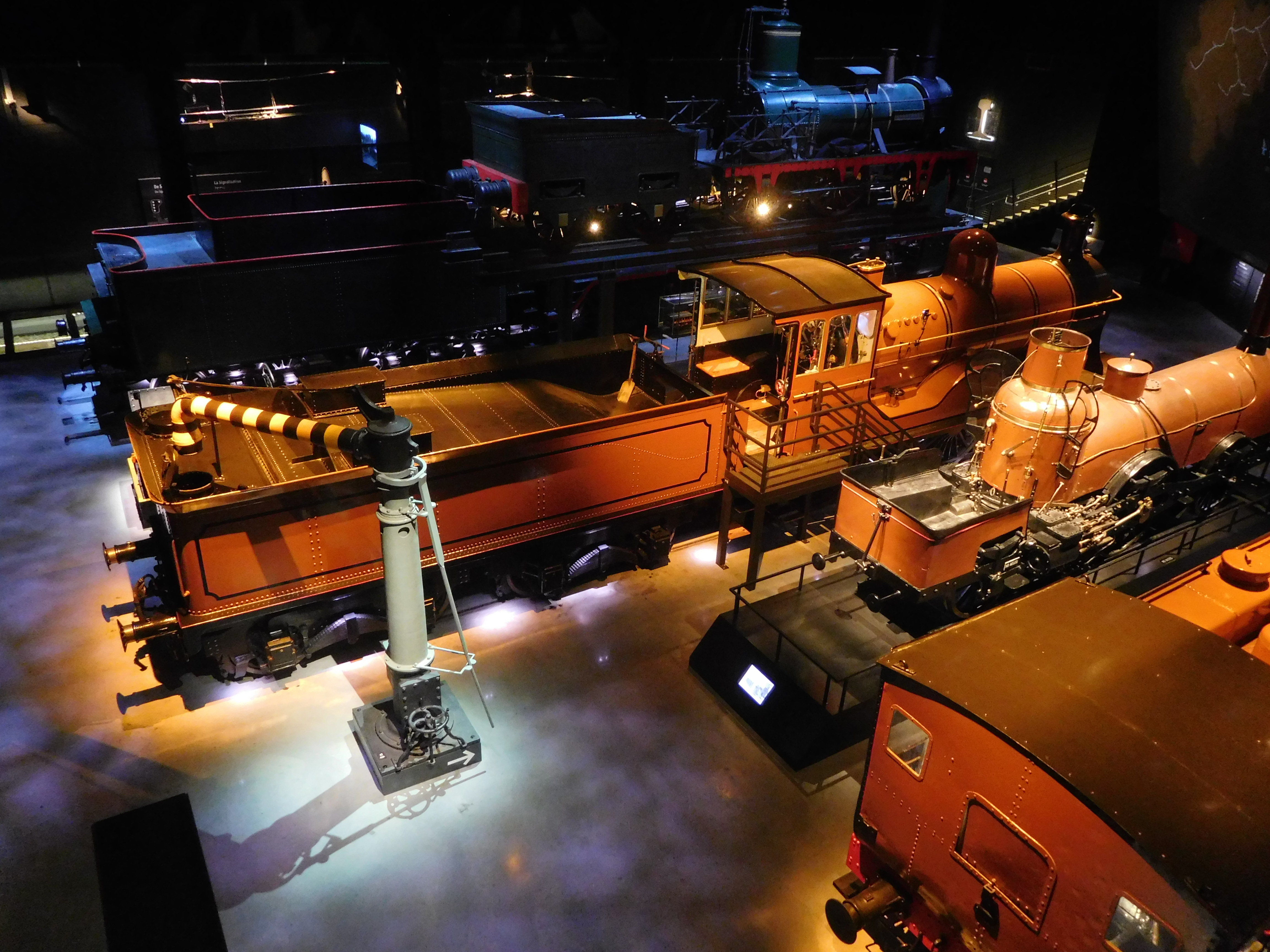 première halle de Train World